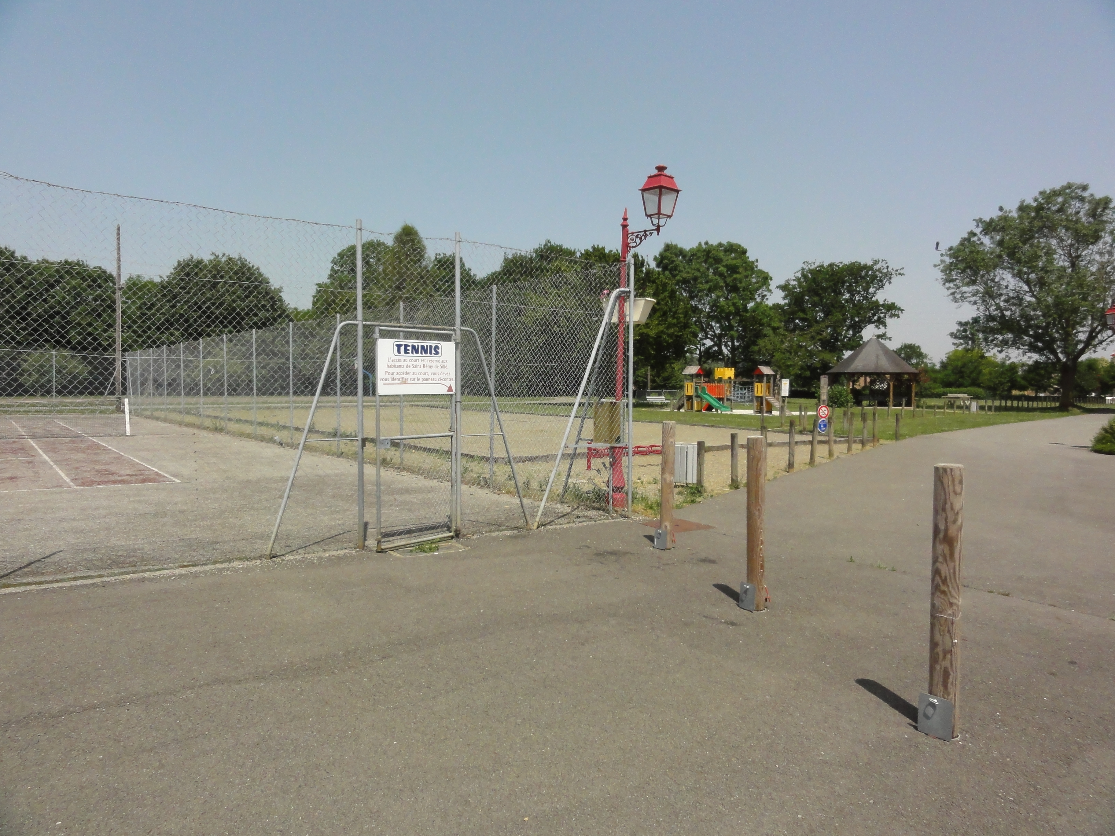 Saint-Rémy-de-Sillé (Sarthe) terrain multisports